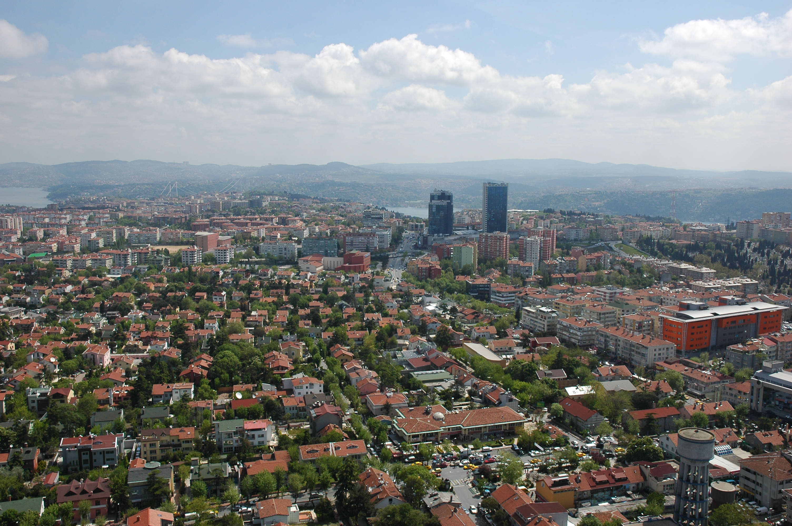 Etiler, Istanbul, Turkey.